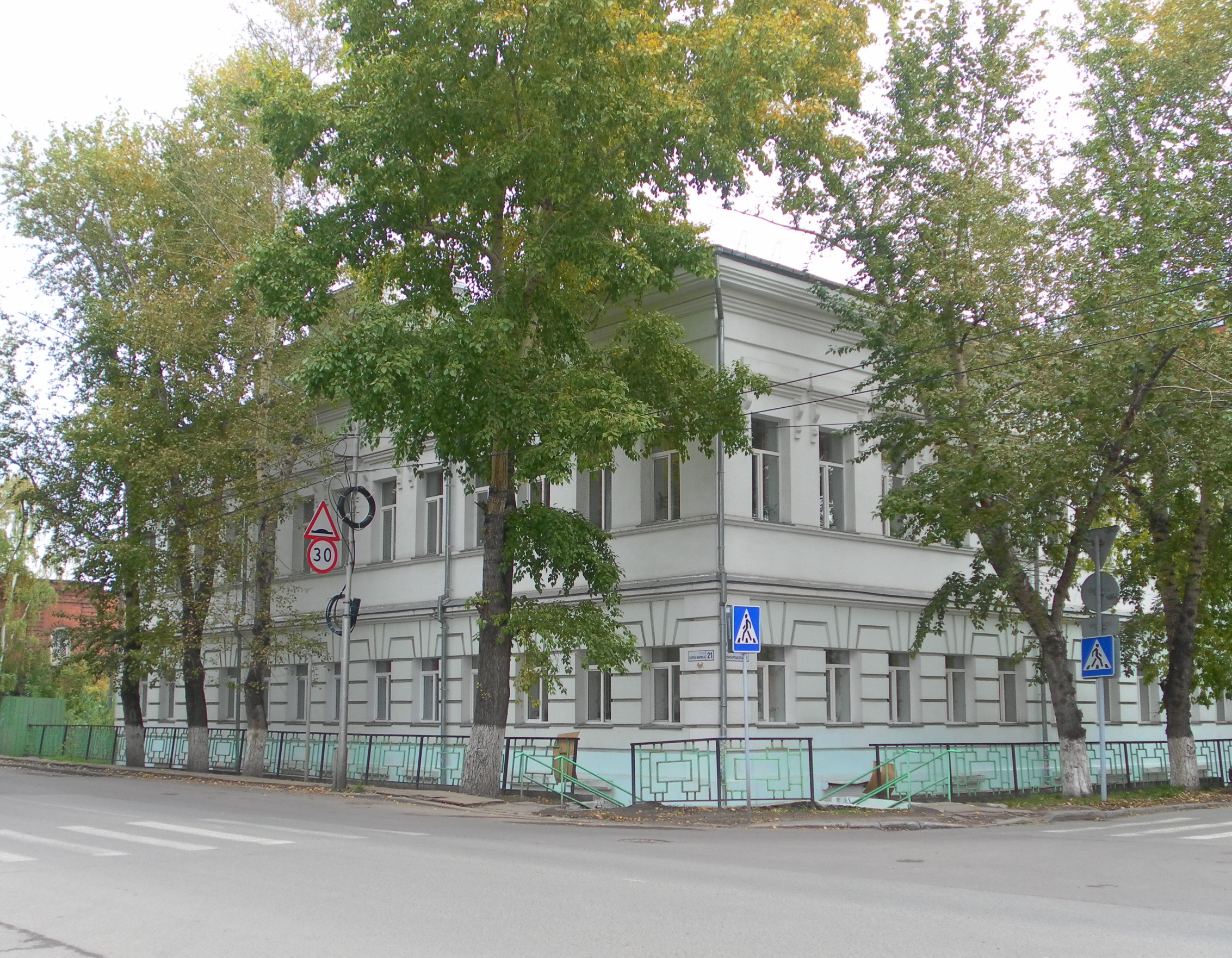 г. Томск, ул. Карла Маркса, 21. Гимназия была открыта в середине XIX века, сейчас там располагается средняя школа № 3.